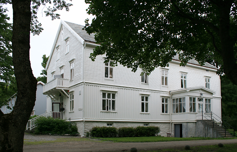 Hovedbygning, Tjøtta, Alstahaug. I dag Tjøtta gjestegard